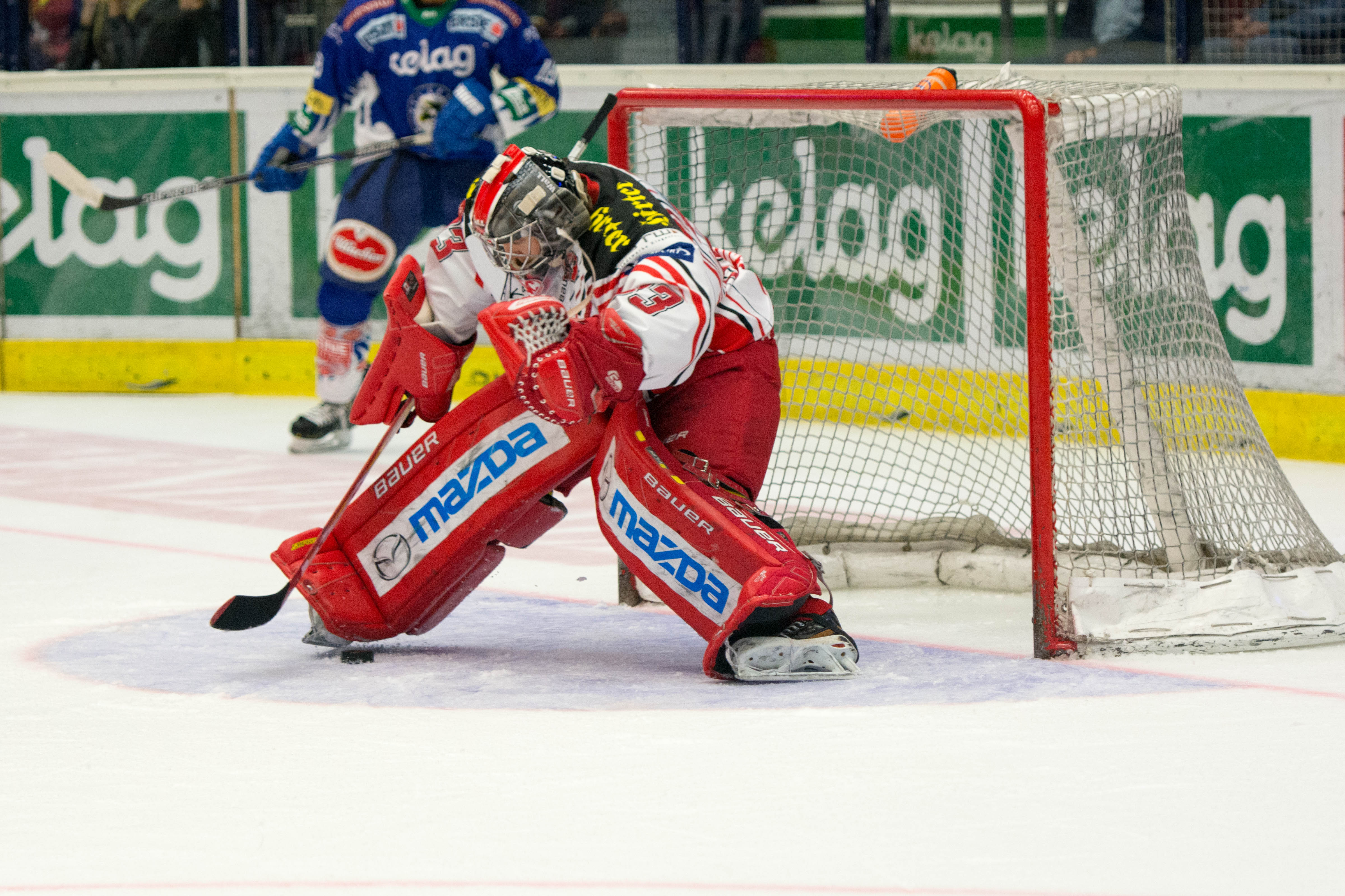 12.10.2014, Stadthalle Villach, AUT,EBEL,EC VSV vs. EC KAC im Bild Pekka TUOKKOLA, (EC KAC,#83)